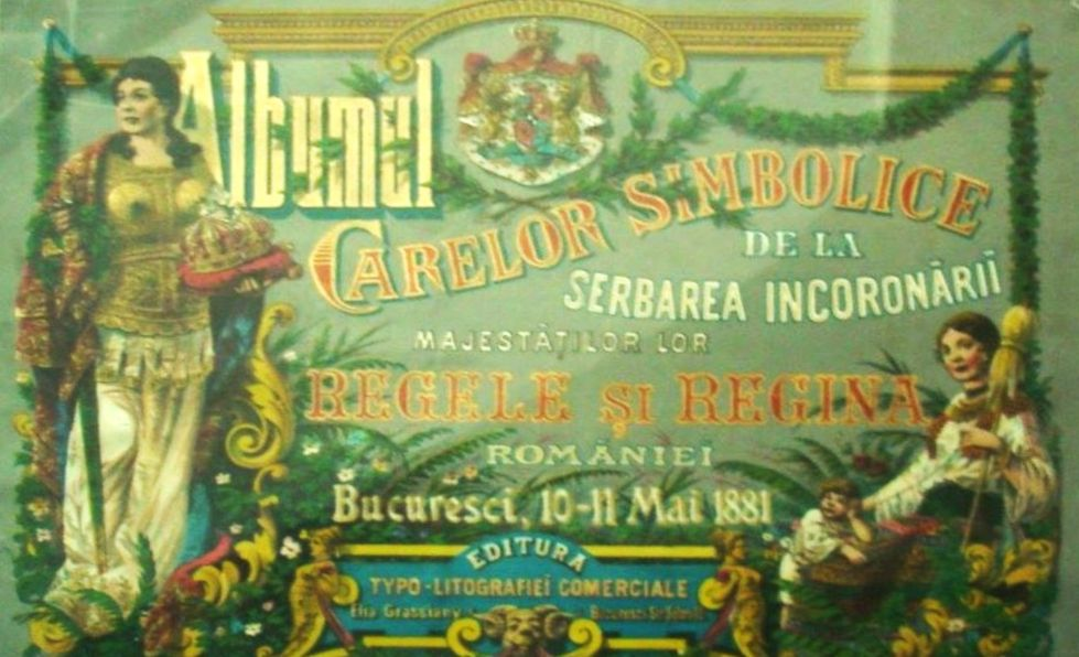 Albumul Carelor Simbolice de la serbarea încoronării Majestăților Lor Regele și Regina României - Muzeul Național al Hărților și Cărții Vechi din București